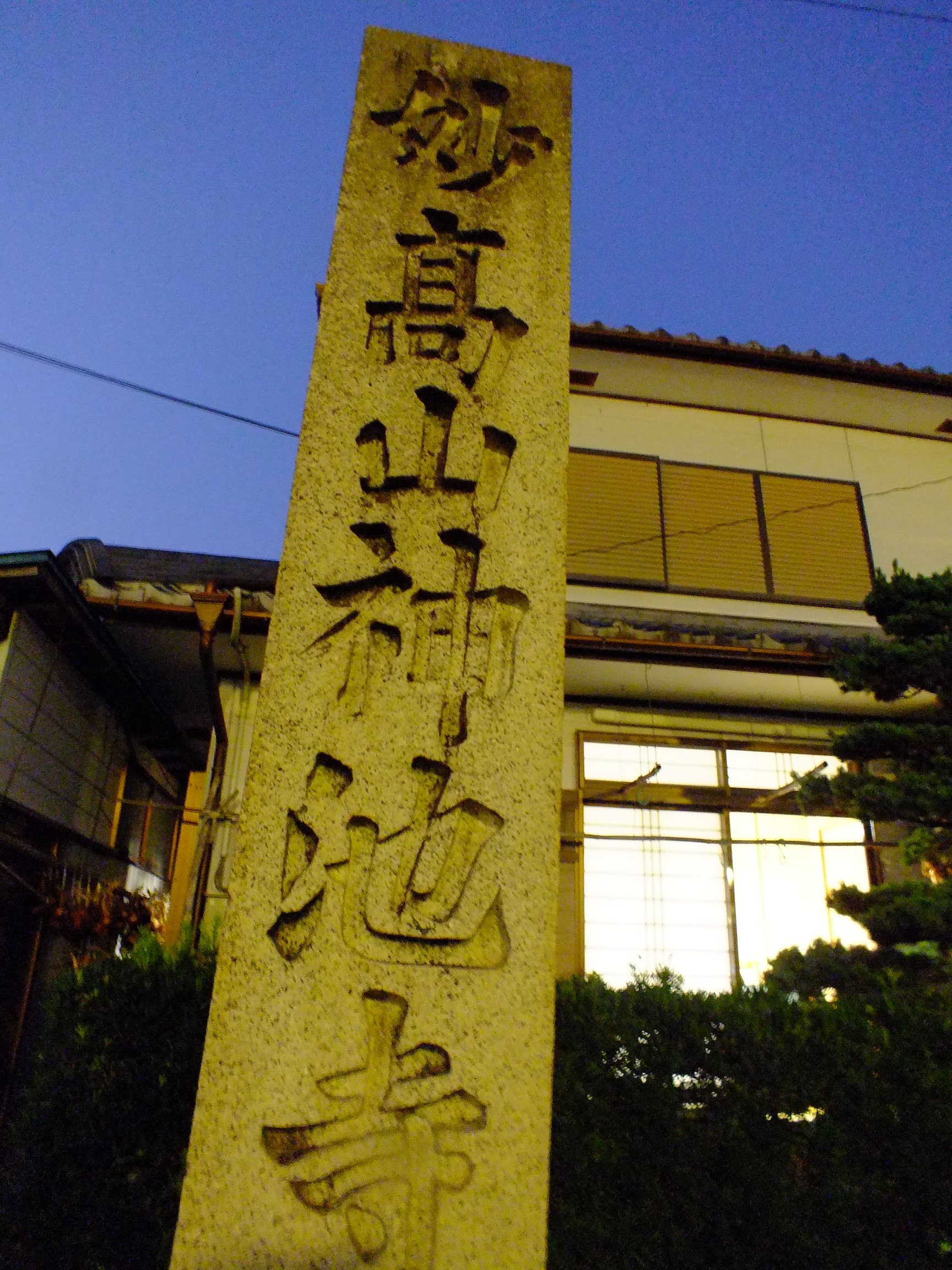 20140729 Ichijima-Kawasuso Matsuri 市島川裾祭（丹波市市島町）市島駅